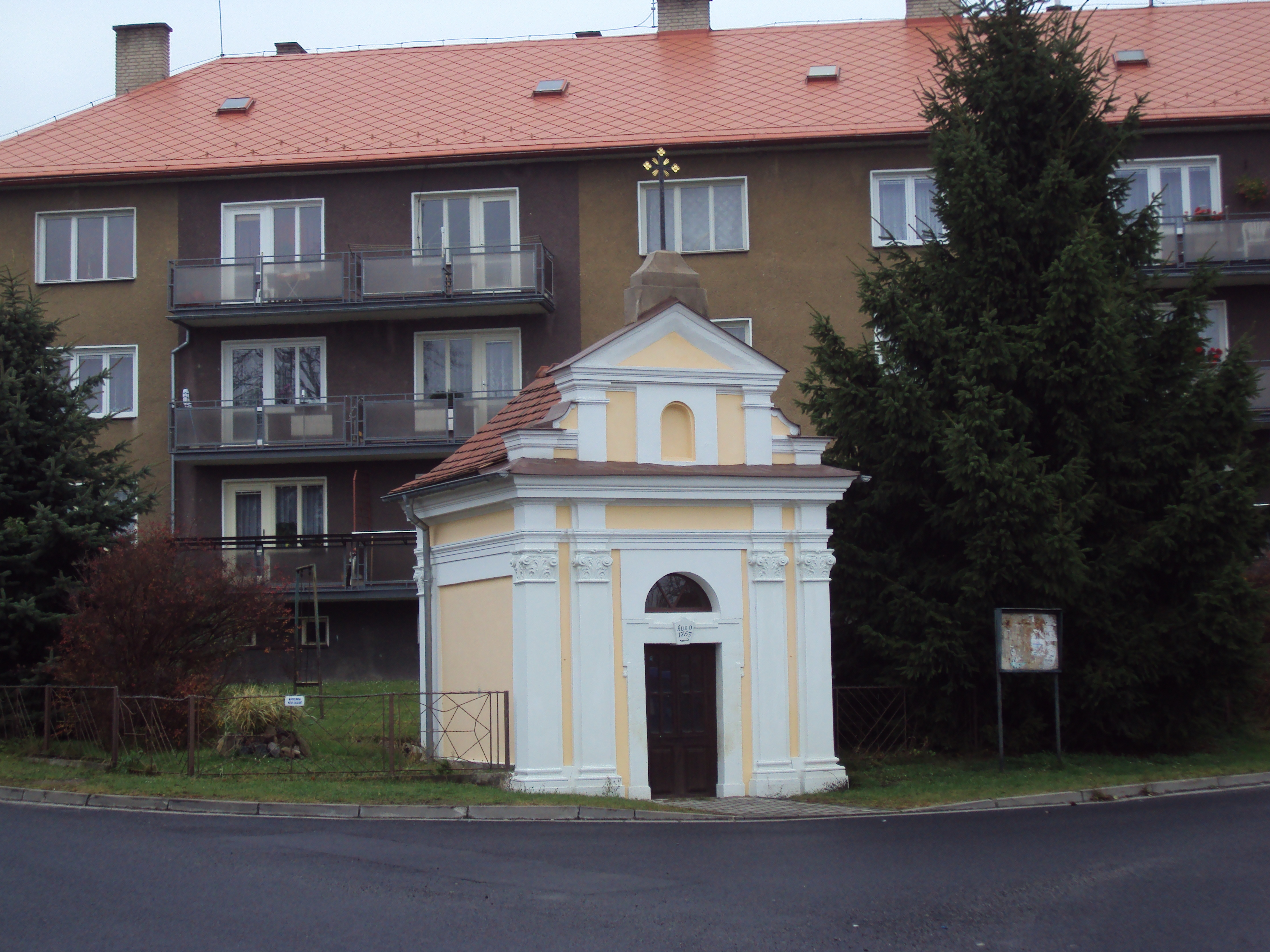 Kaplička z roku 1763 v Arnultovicích, čtvrti Nového Boru